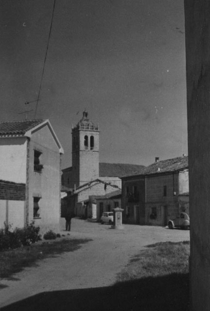 Iglesia de San Martín de Tours - Aldeamayor de San Martín (Valladolid) - Aldeamayor. Torre de Iglesia. - Fotografía 76 x 115 B/N